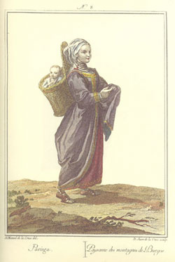 Frau aus Pasiega: Kupferstich von Juan de la Cruz Cano y Olmedilla nach einer Zeichnung von Manuel de la Cruz.